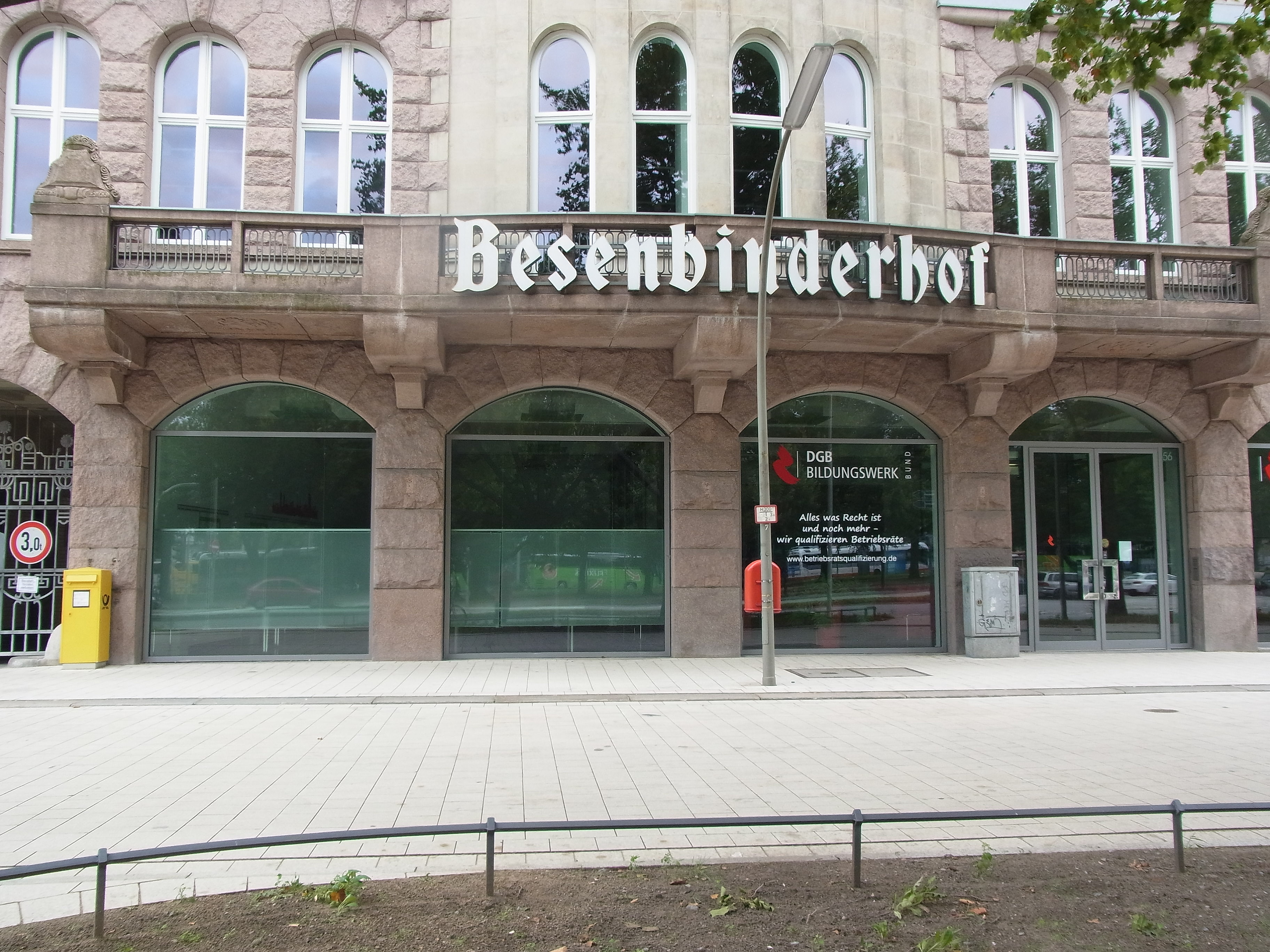 Teilansicht des Gewerkschaftshauses, Besenbinderhof 56. Eingetragen in der DL St. Georg als Verwaltungsgebäude mit Gaststätte und Saal. Erbaut zwischen 1903 und 1913.This is a photograph of an architectural monument.